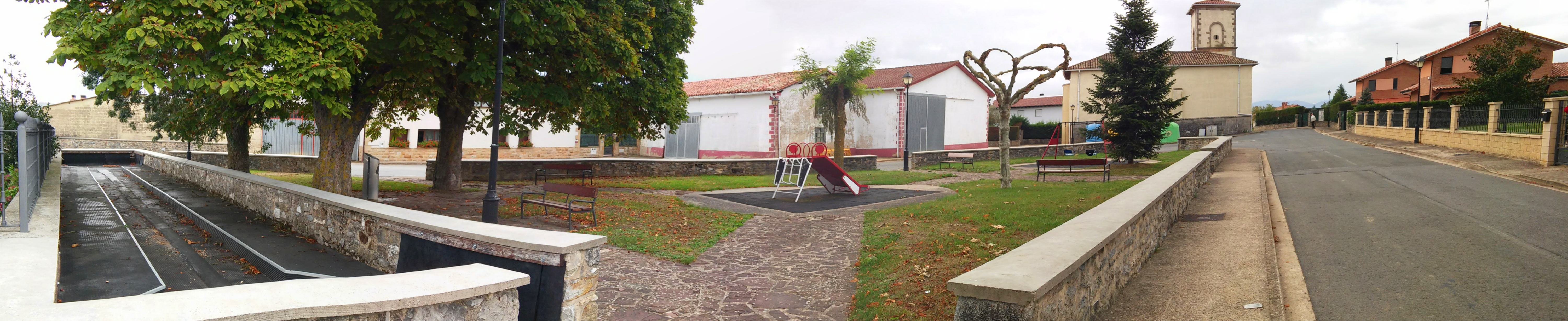 Erretana herriko plaza eta bolatokia (Gasteiz)